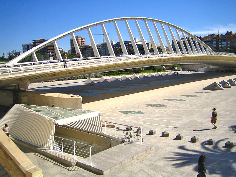 Pont de l'Exposició amb l'accés a l'estació d'Alameda baix a l'esquerra. Situat al Jardí del Túria, València